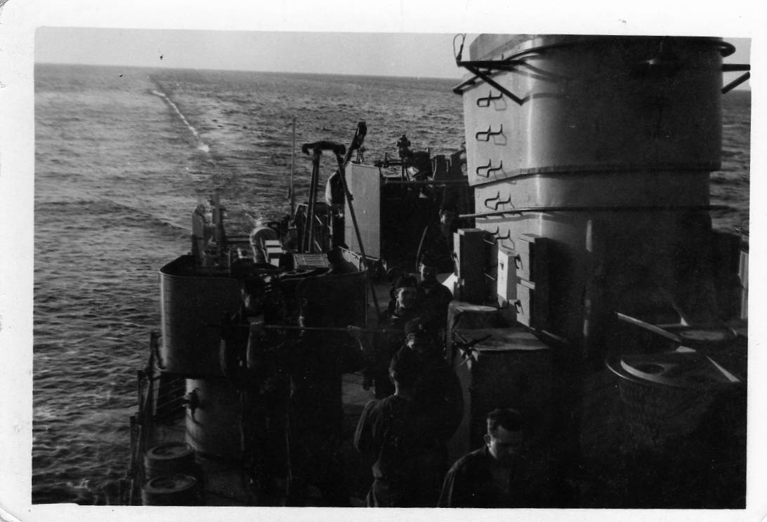 Podczas trałowania 1960r.